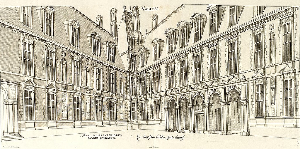 Façades intérieures du château de Vallery, le pavillon central et les deux hôtels.